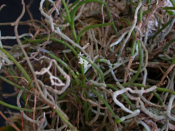 Campylocentrum ornithorrhynchum - São Paulo